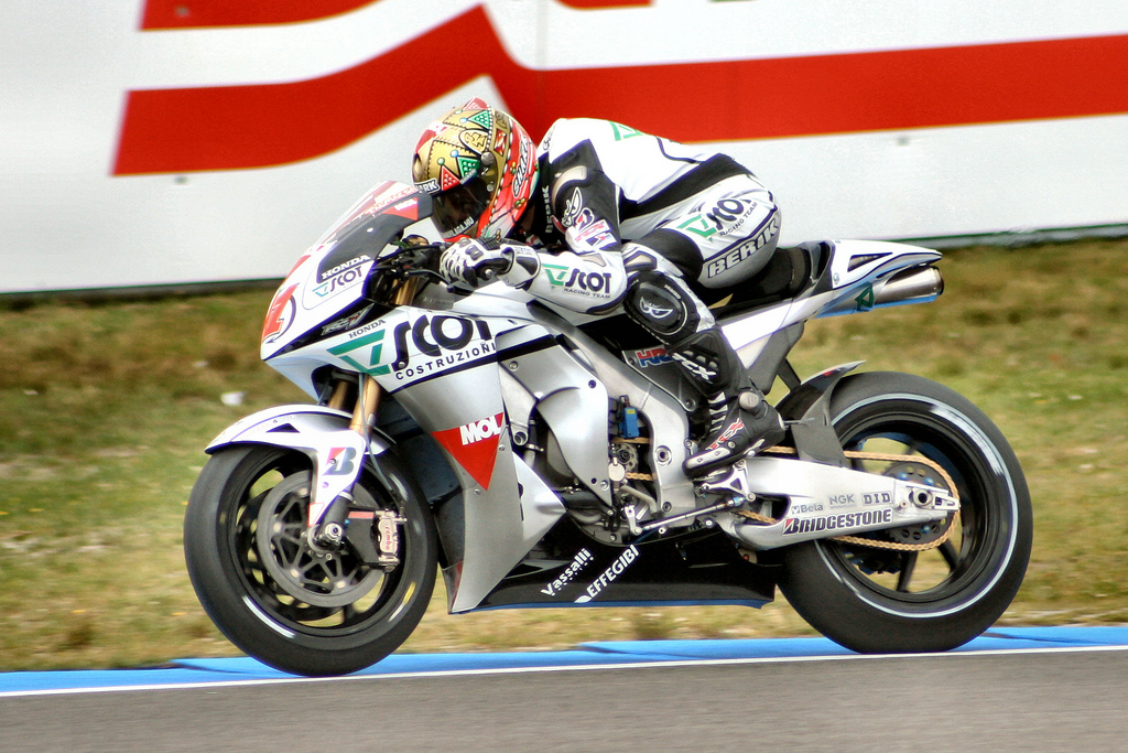 Gabor Talmacsi